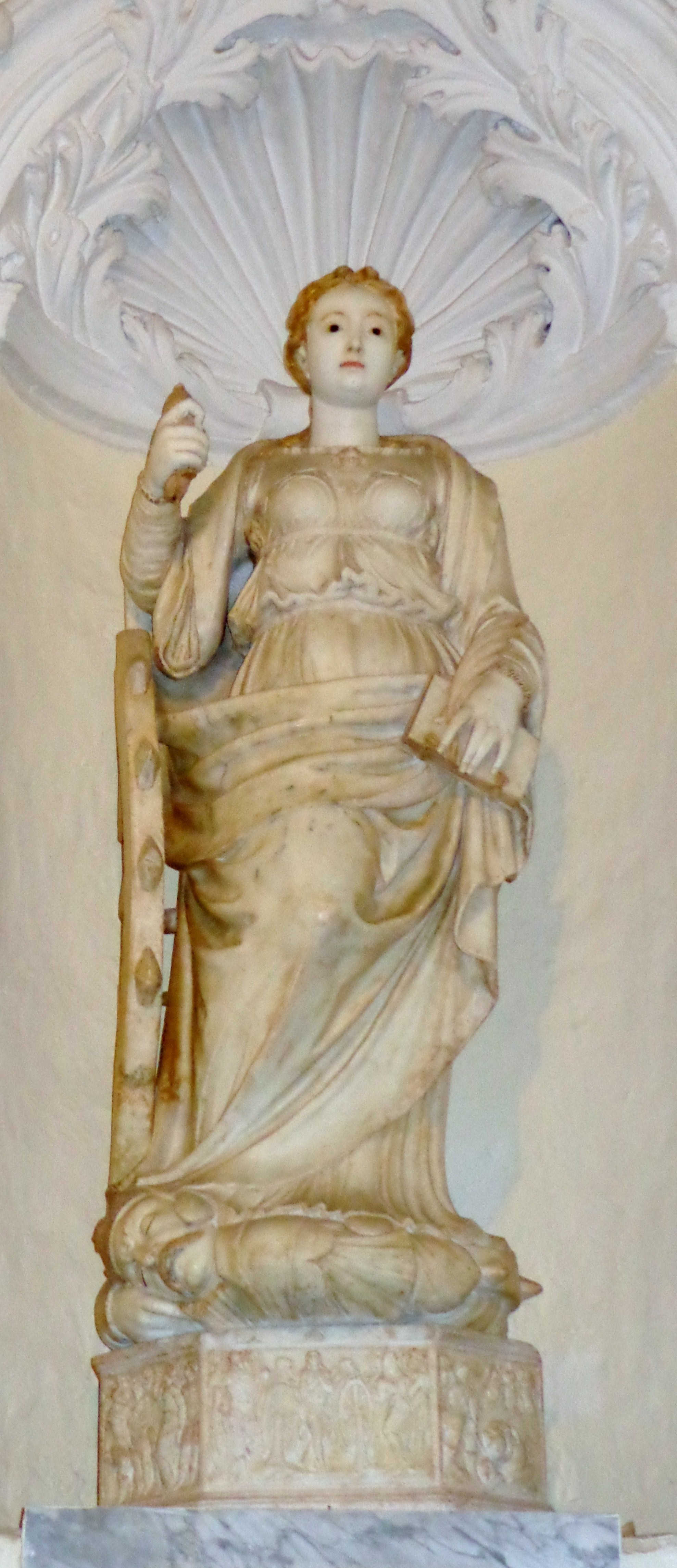 Santa Caterina d'Alessandria Milazzo